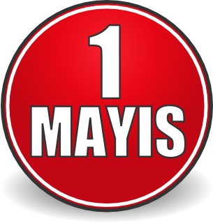 1 Mayıs'ı simgeleyen bir yazı